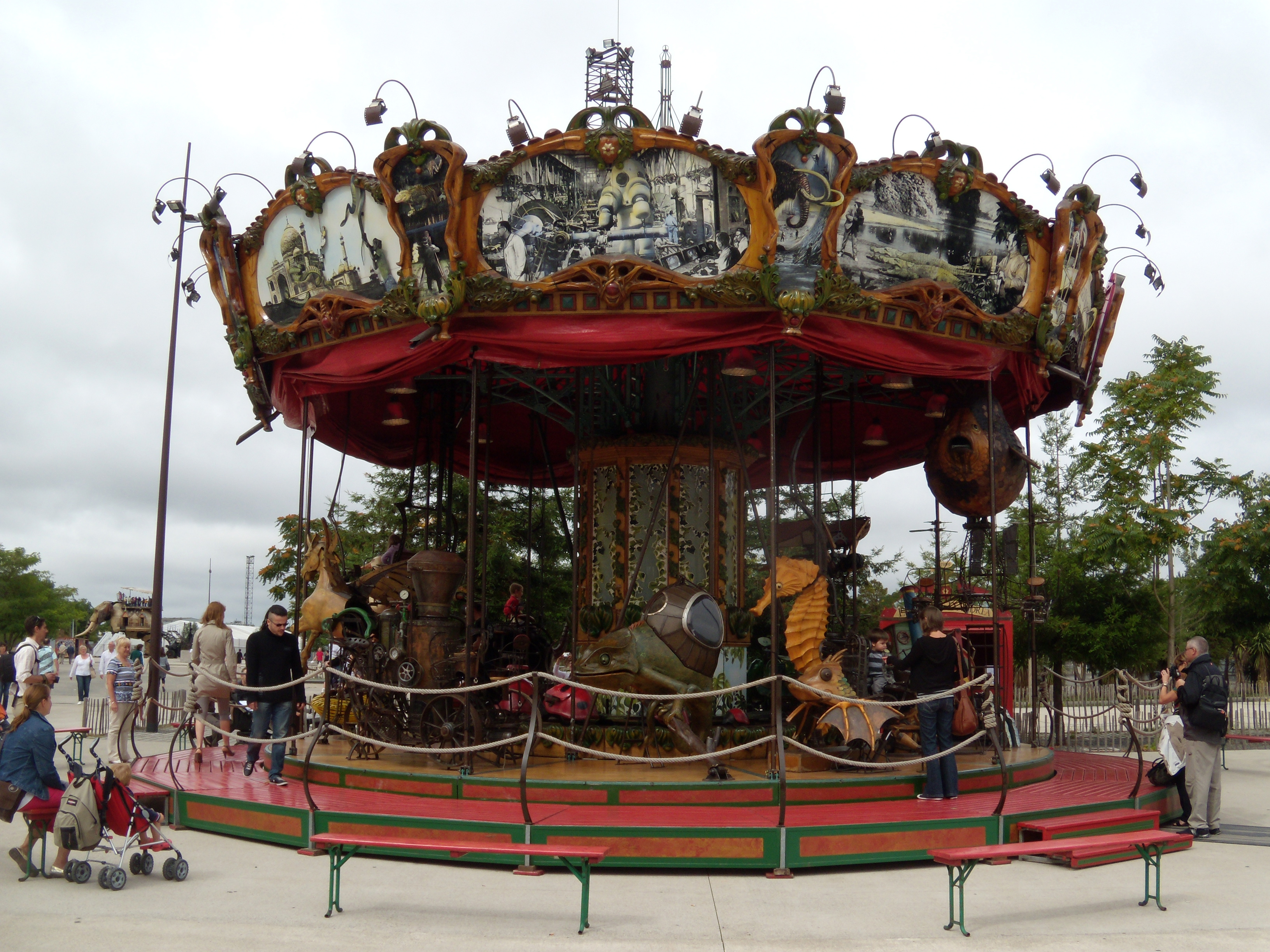 Le Manège d'Andréa, par François Delarozière (Nantes)